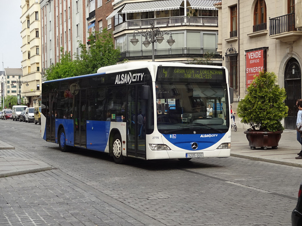 Autobús interurbano de León